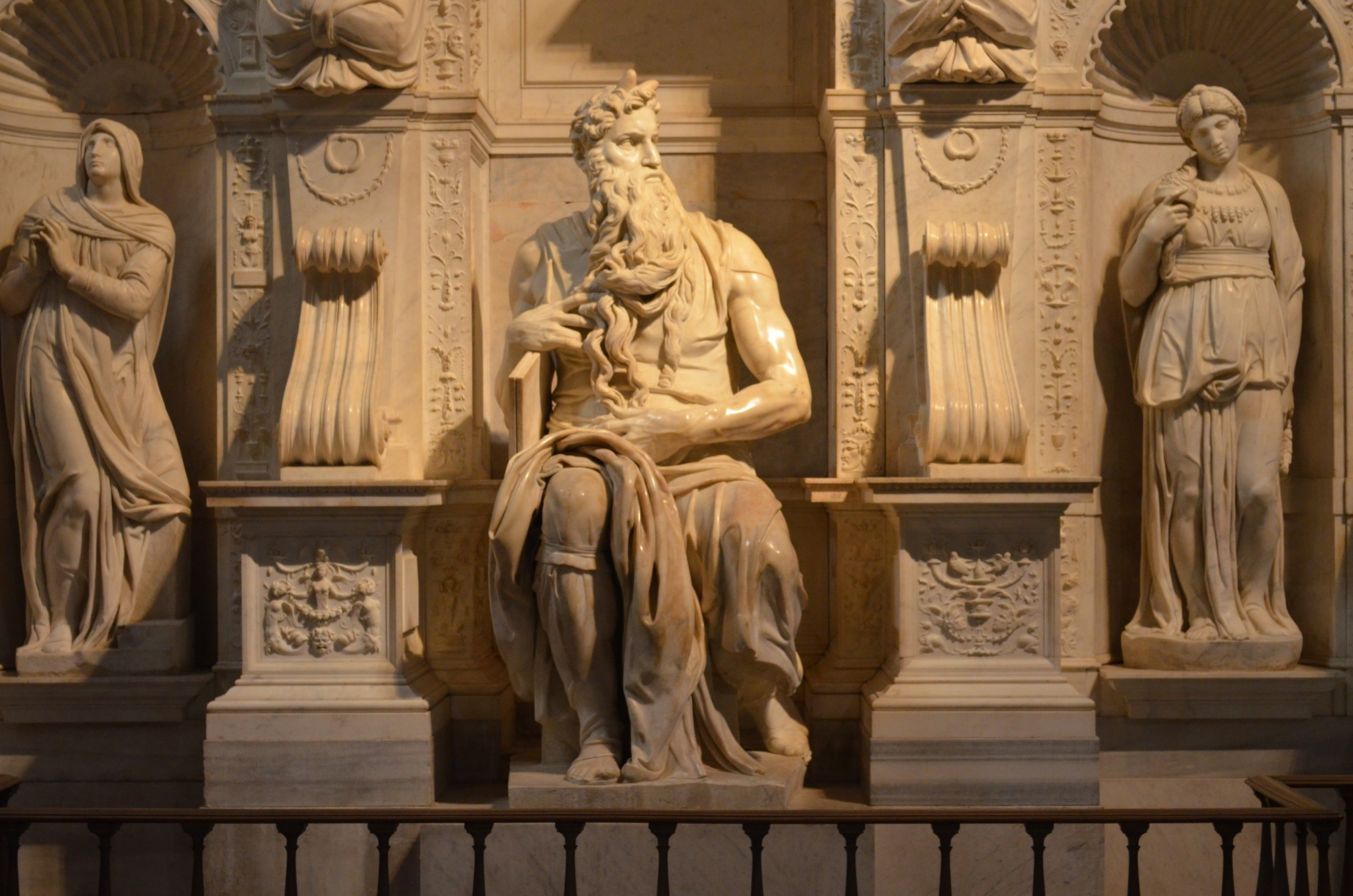 Un rayo de luz de sol ilumina a Moisés